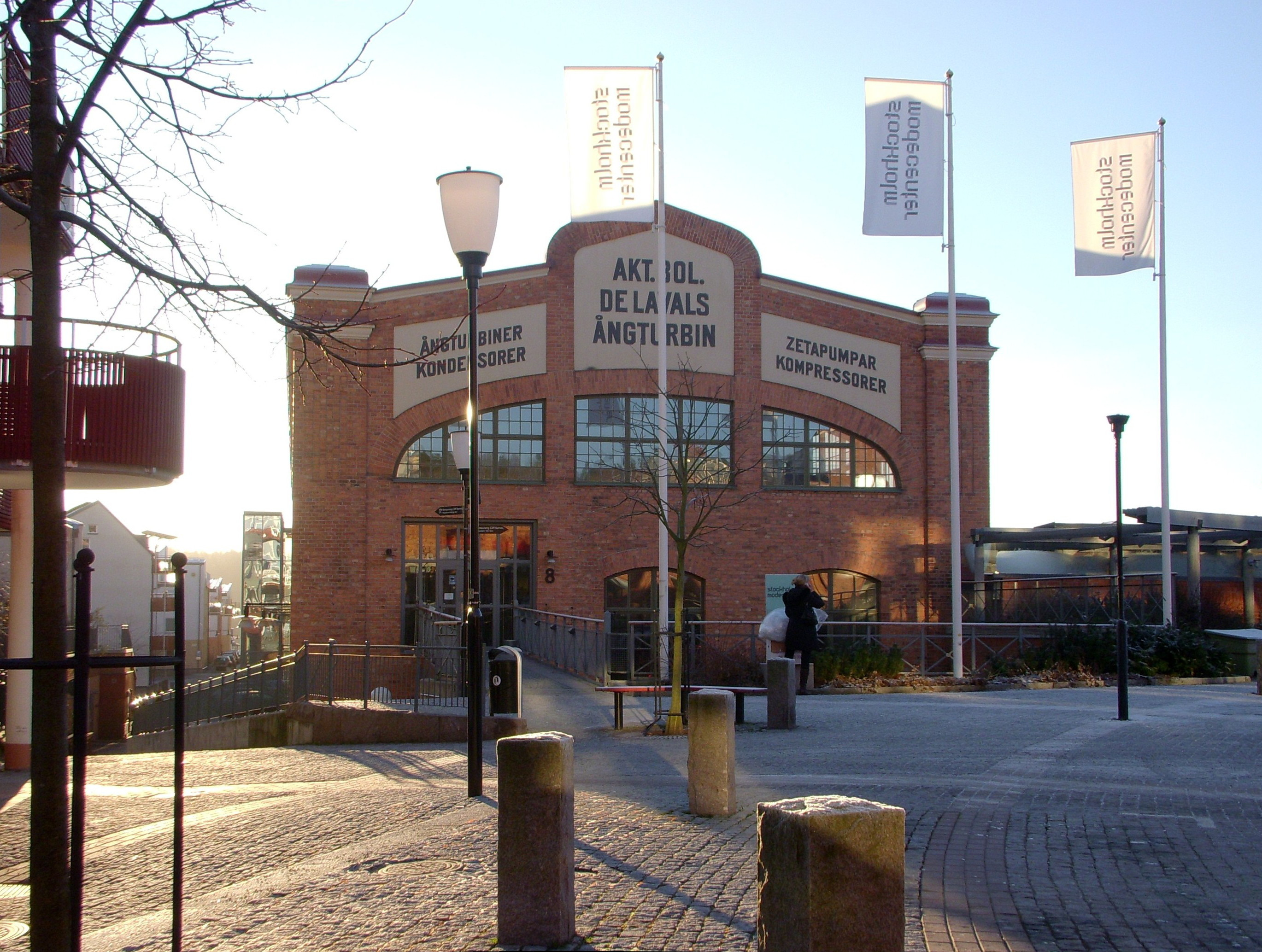 Stadsdelen Järla sjö i Nacka, torget